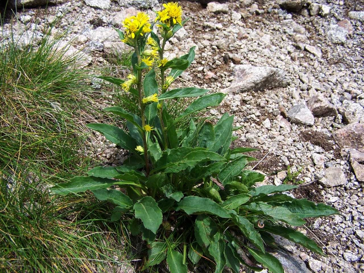 Solidago alpestris = S. viragaurea subsp. apestris (pl. nawłoć alpejska), habitat: Tatra Mountains, Dolina Gąsienicowa